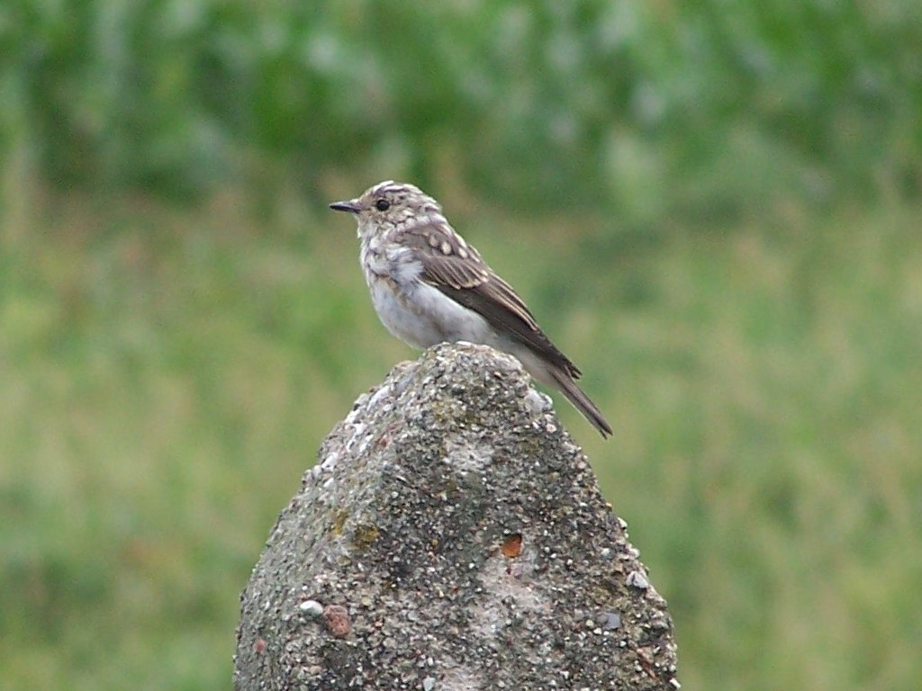 Muscicapa striata, August 2006, Kręgi Nowe, Poland